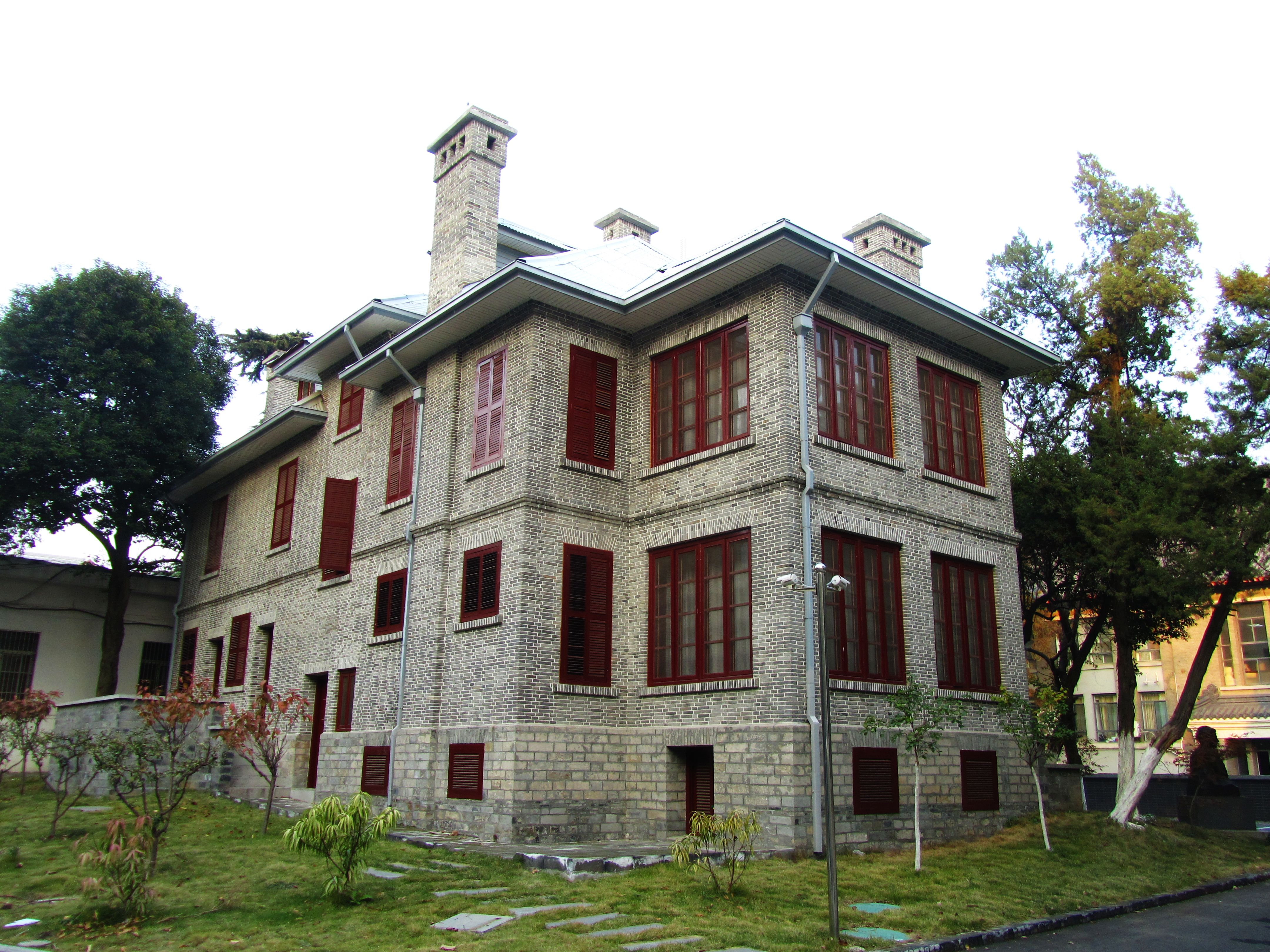 南京赛珍珠故居，自西南侧拍摄。